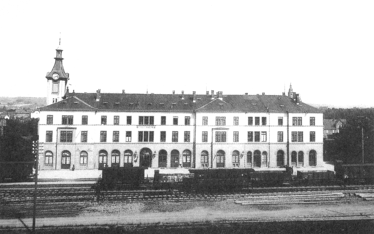 Bahnhof in Crailsheim nach dem Umbau von 1875.